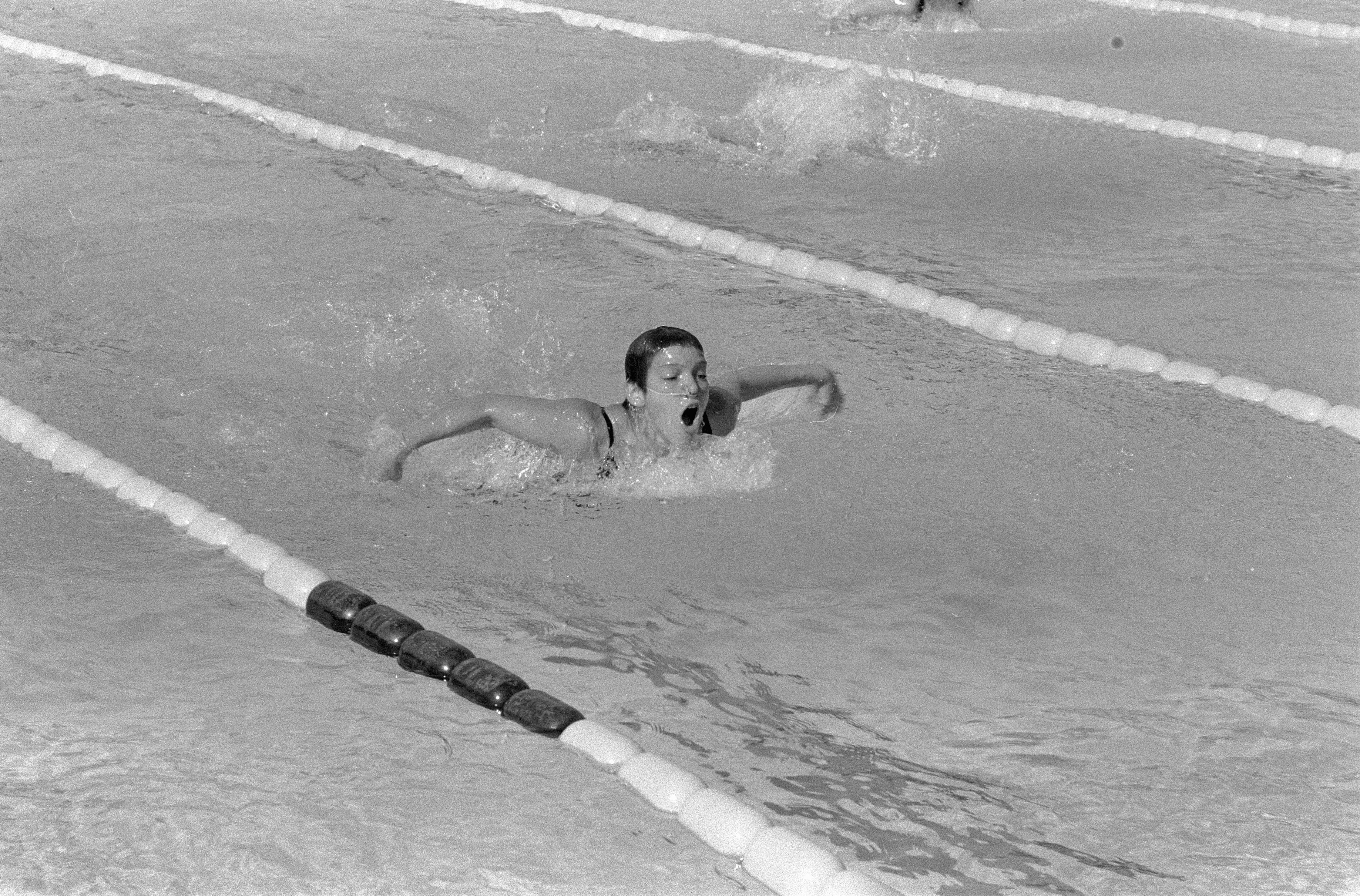 Olympische Spelen te Rome, Wood in actie (vlinderslag). Location: Italië, Rome